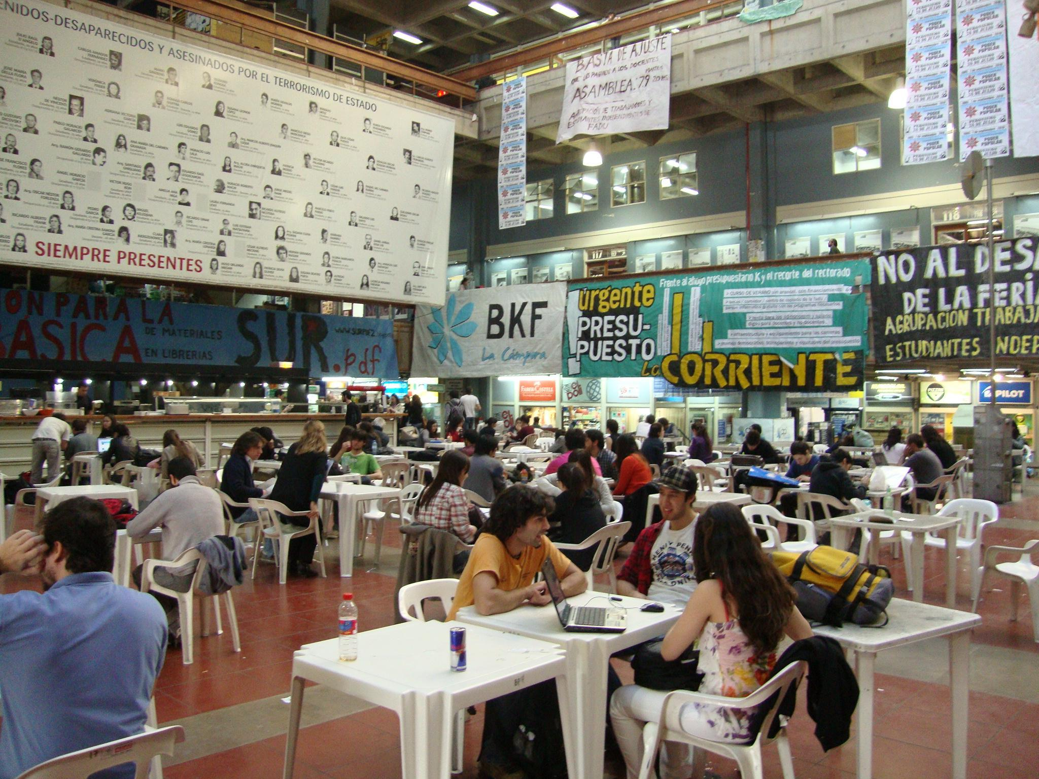 Patio central de la Facultad de Arquitectura, Diseño y Urbanismo de la Universidad de Buenos Aires. A la izquierda, una gran pancarta que recuerda a los miembros de la comunidad educativa asesinados o desaparecidos entre 1973 y 1983.